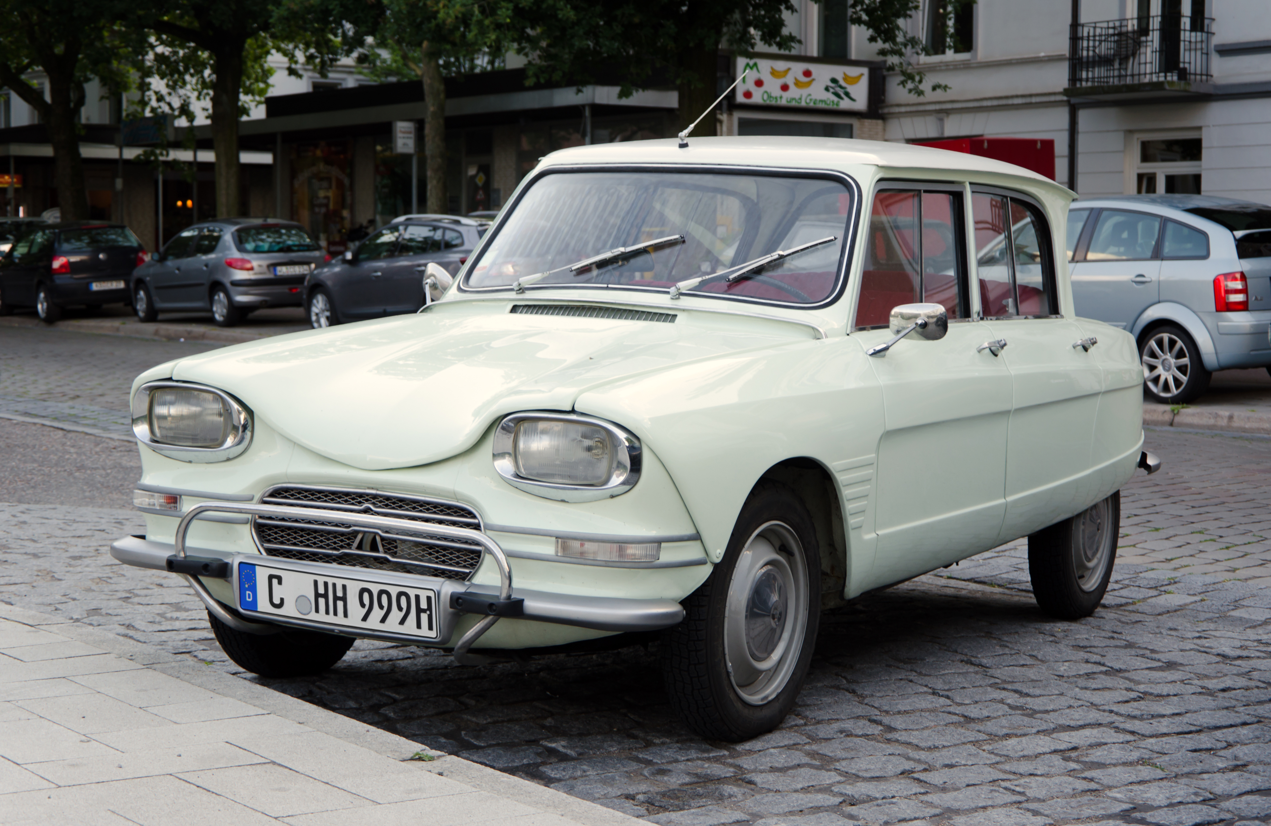 Citroën Ami 6